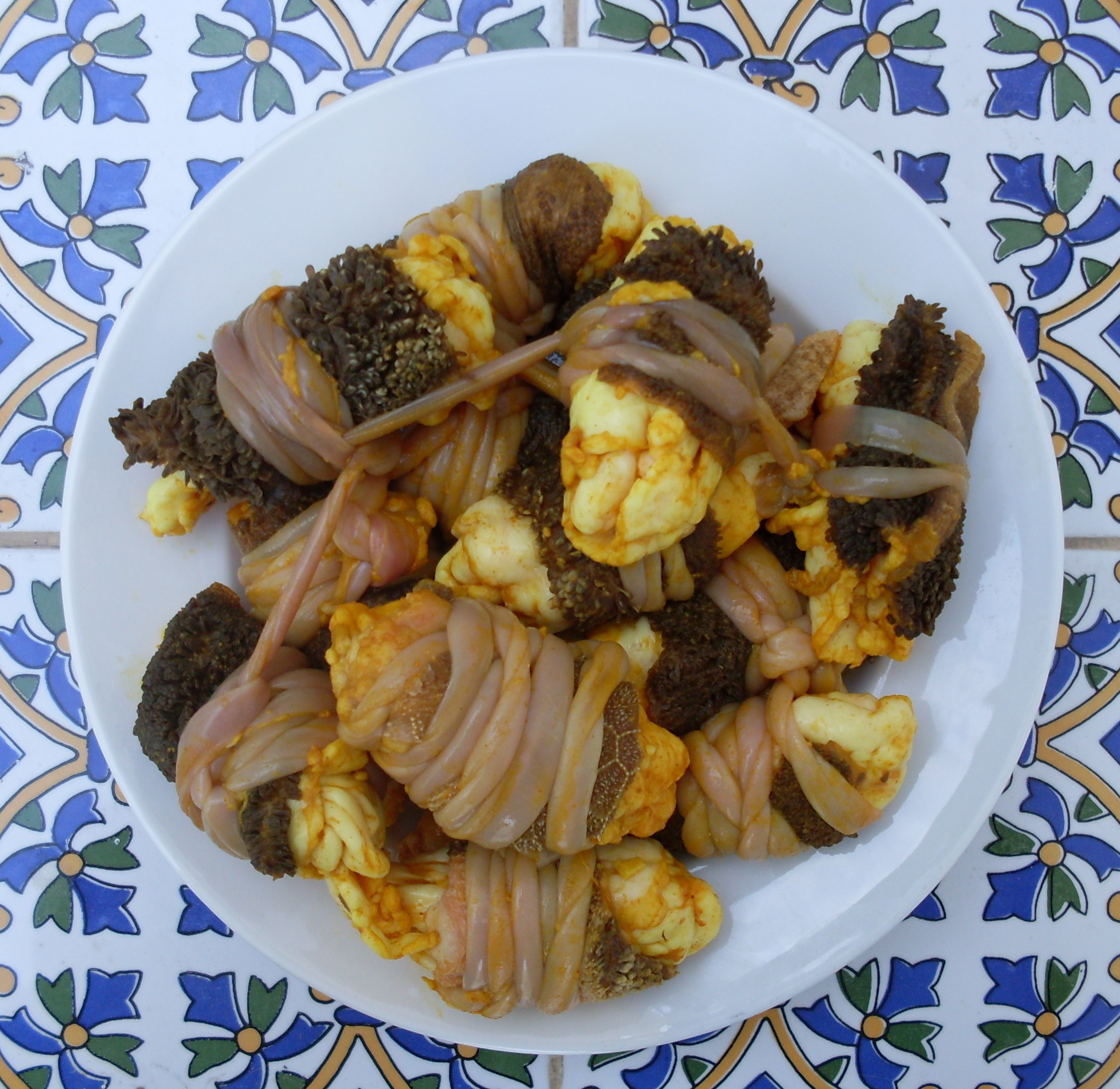 Plat Djerbien à base de Tripes asséchées